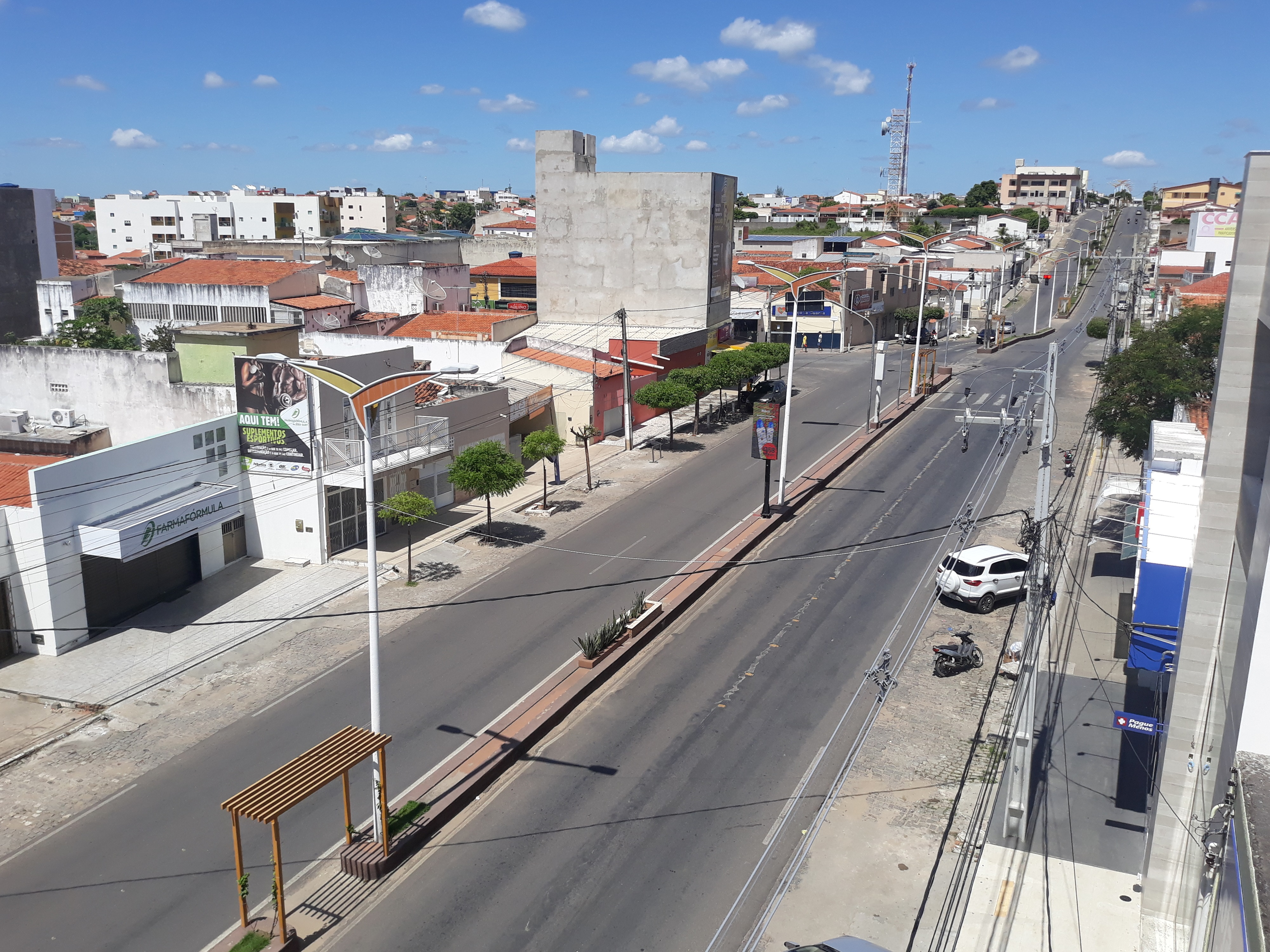 Avenida da Independência, importante logradouro da cidade de Pau dos Ferros, no Rio Grande do Norte (Brasil)